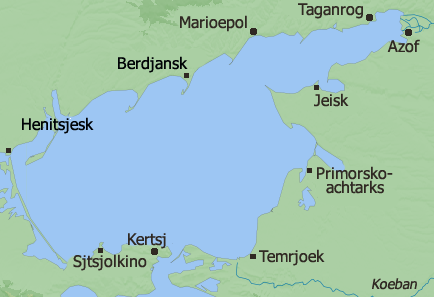 Stede om die See van Azof